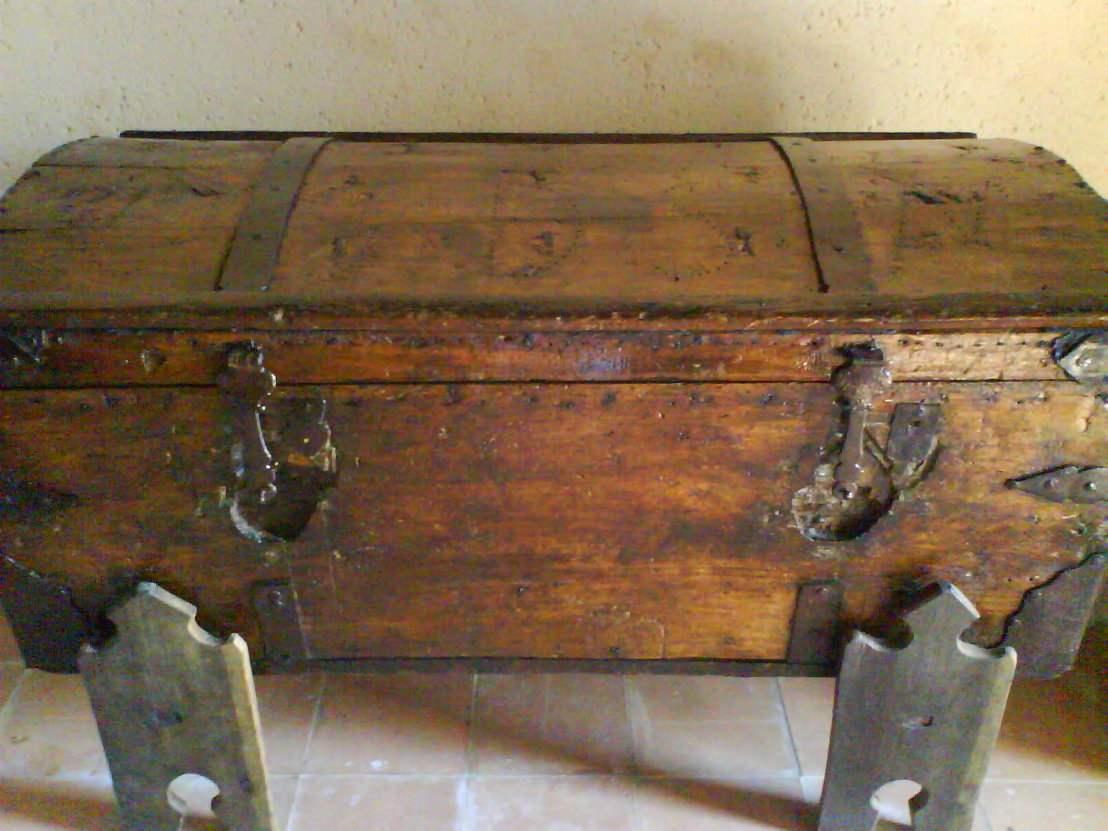 Baúl español del S. XVIII de los denominados de doble llave. Realizado en madera de roble con herrajes de hierro